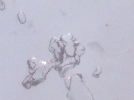 Tibicos colony, magnified 200x